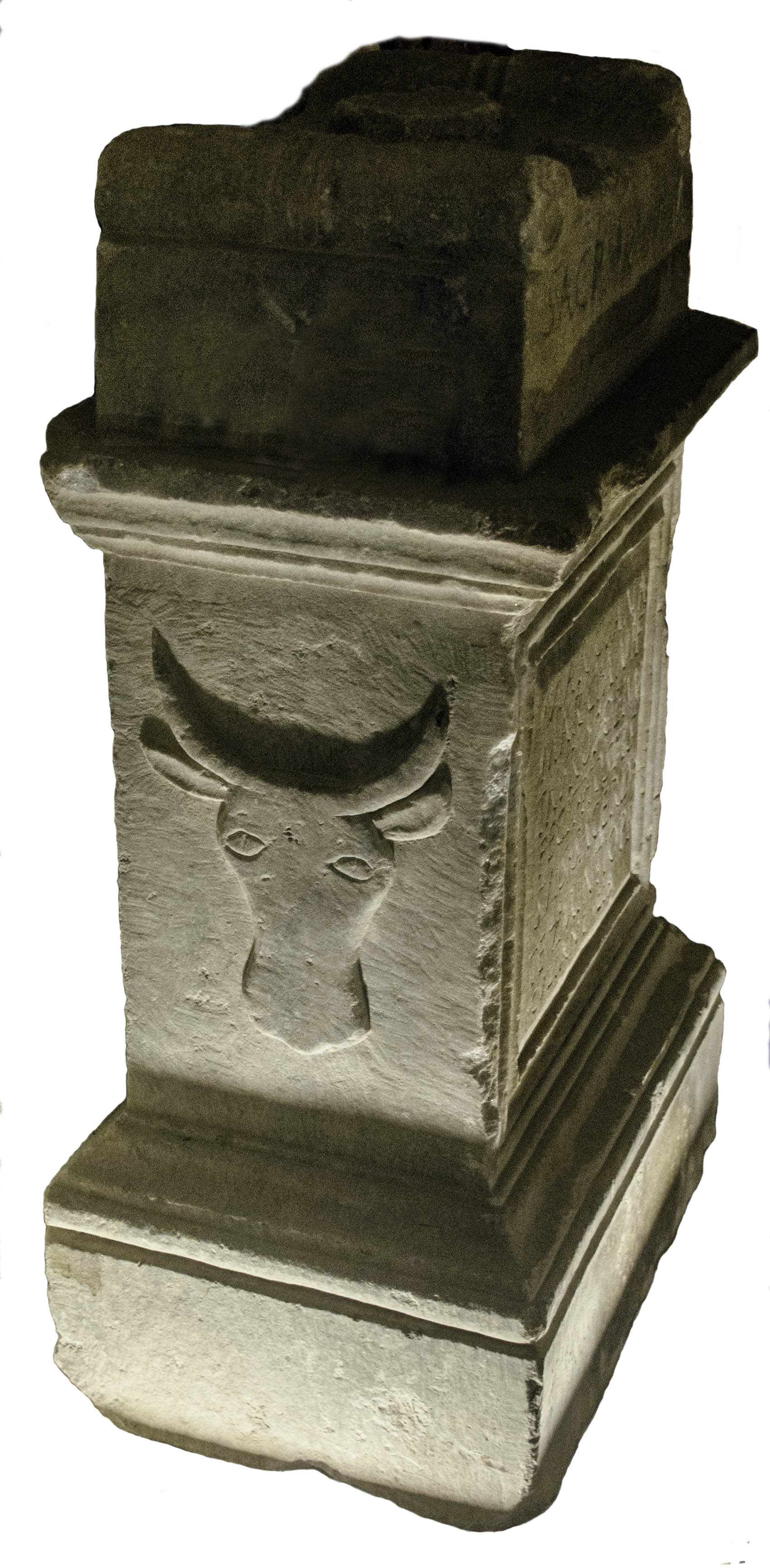 Autel taurobolique de Marciana, face latérale gauche. Musée Eugène-Camoreyt de Lectoure, Gers, France.